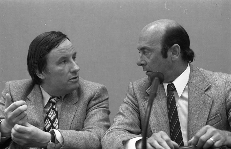 Sitzung des Bundestages-Verteidigungsausschusses zu Bremer Ausschreitungen anläßlich der Vereidigung von Bundeswehrsoldaten.